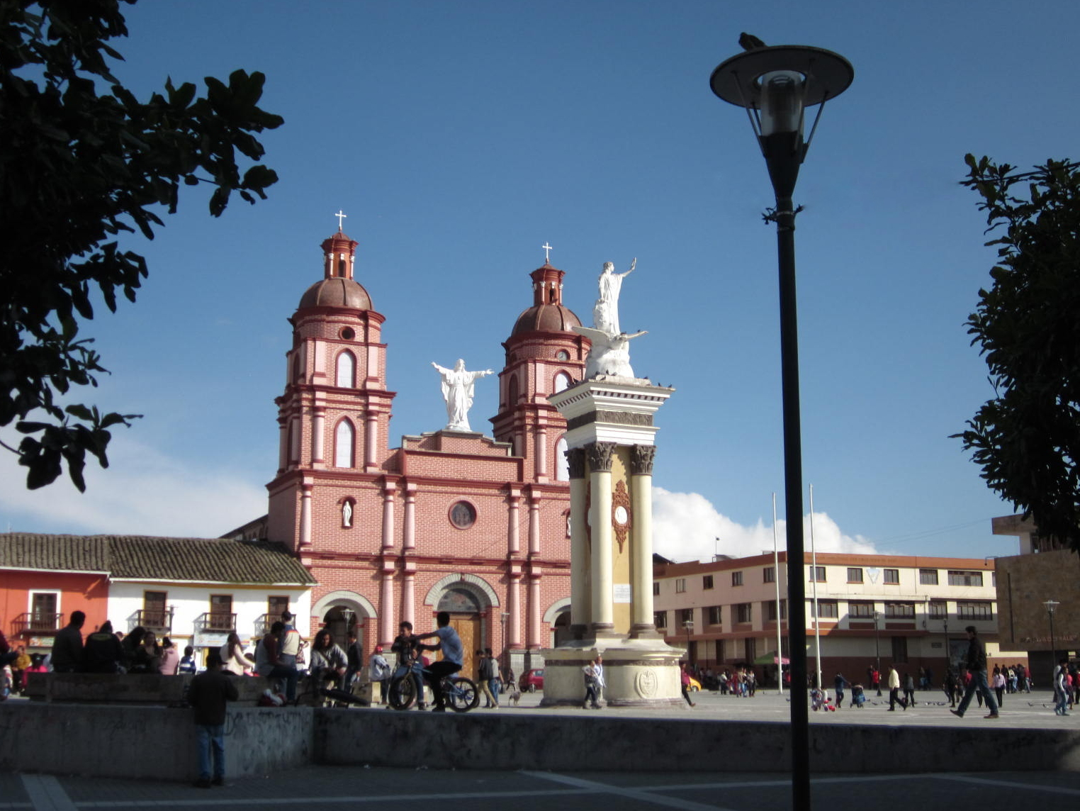 Plaza Veinte de Julio en Ipiales (Nariño-Colombia), ciudad en la frontera colombo-ecuatoriana.